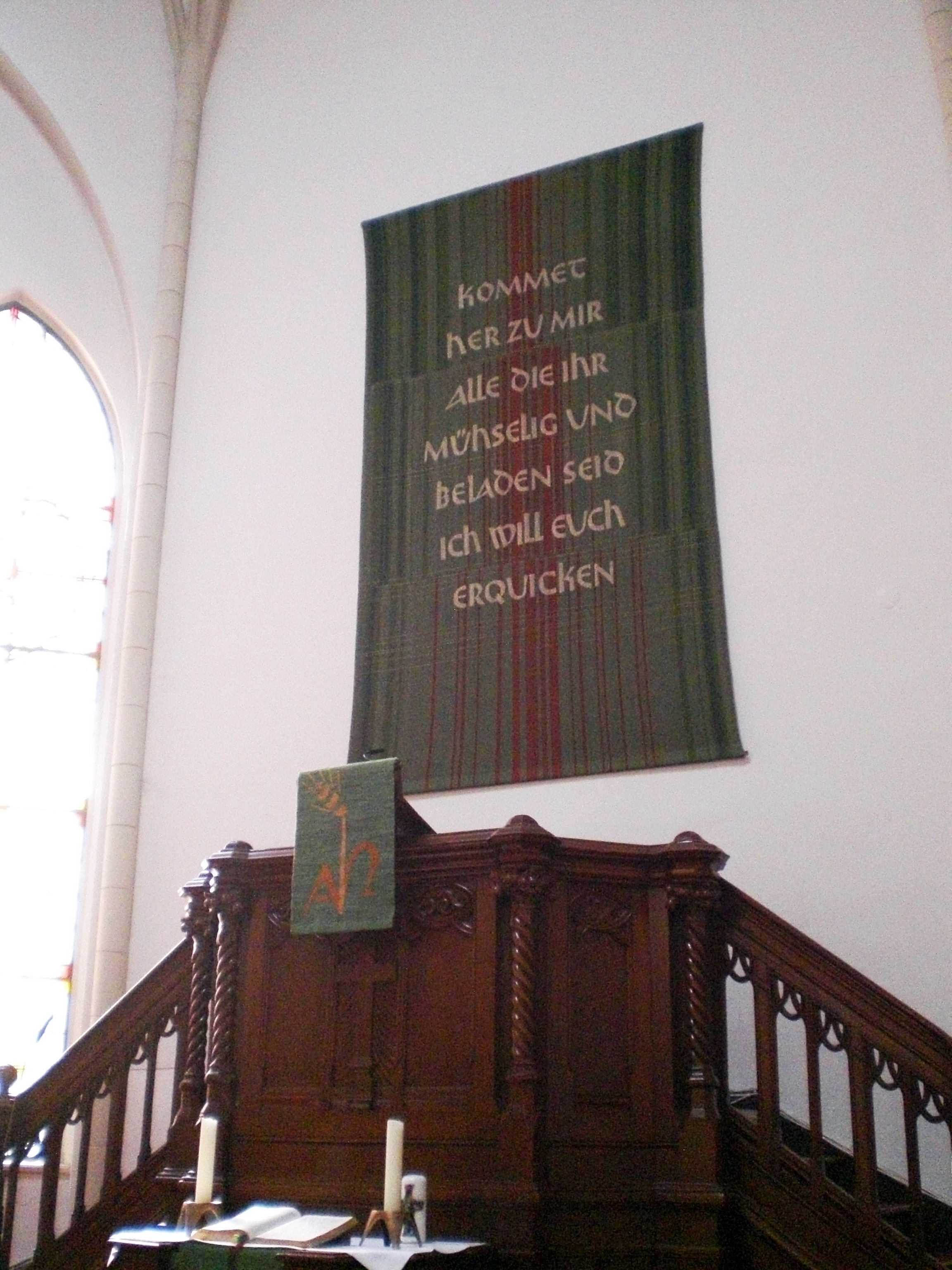 Günter Johl, Altarteppich mit dem Heilandsruf (1962), Christus-Kirche in Berlin-Kreuzberg.